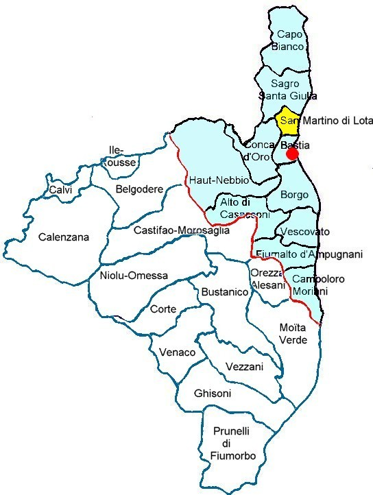 Localisation du canton de San-Martino-di-Lota, Capicorsu, Haute-Corse